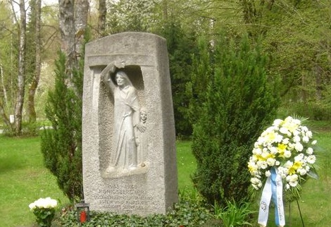 Fotografie des Gedenksteins für die 100.000 nach 1945 in Königsberg (Preußen) umgekommenen Menschen auf dem Waldfriedhof München